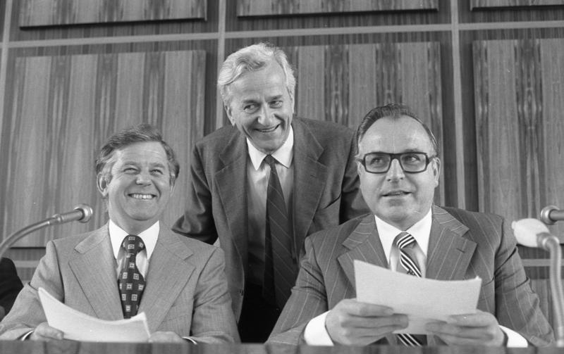 Pressekonferenz des CDU-Bundesvorstands im Tulpenfeld, Bonn (v.l.n.r.: Kurt Biedenkopf, Richard von Weizsäcker, Helmut Kohl)